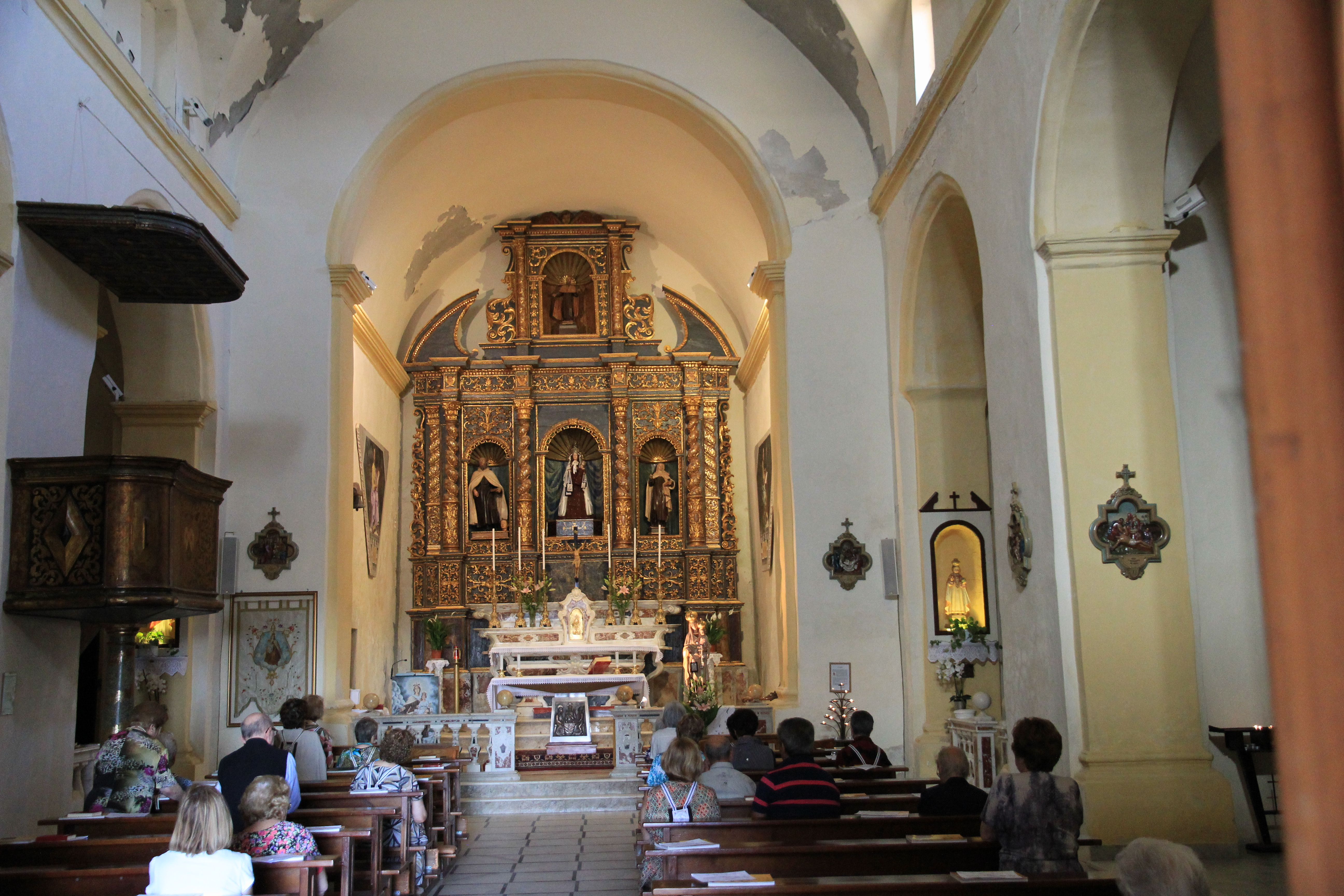 Alghero - Chiesa di Nostra Signora del Carmelo